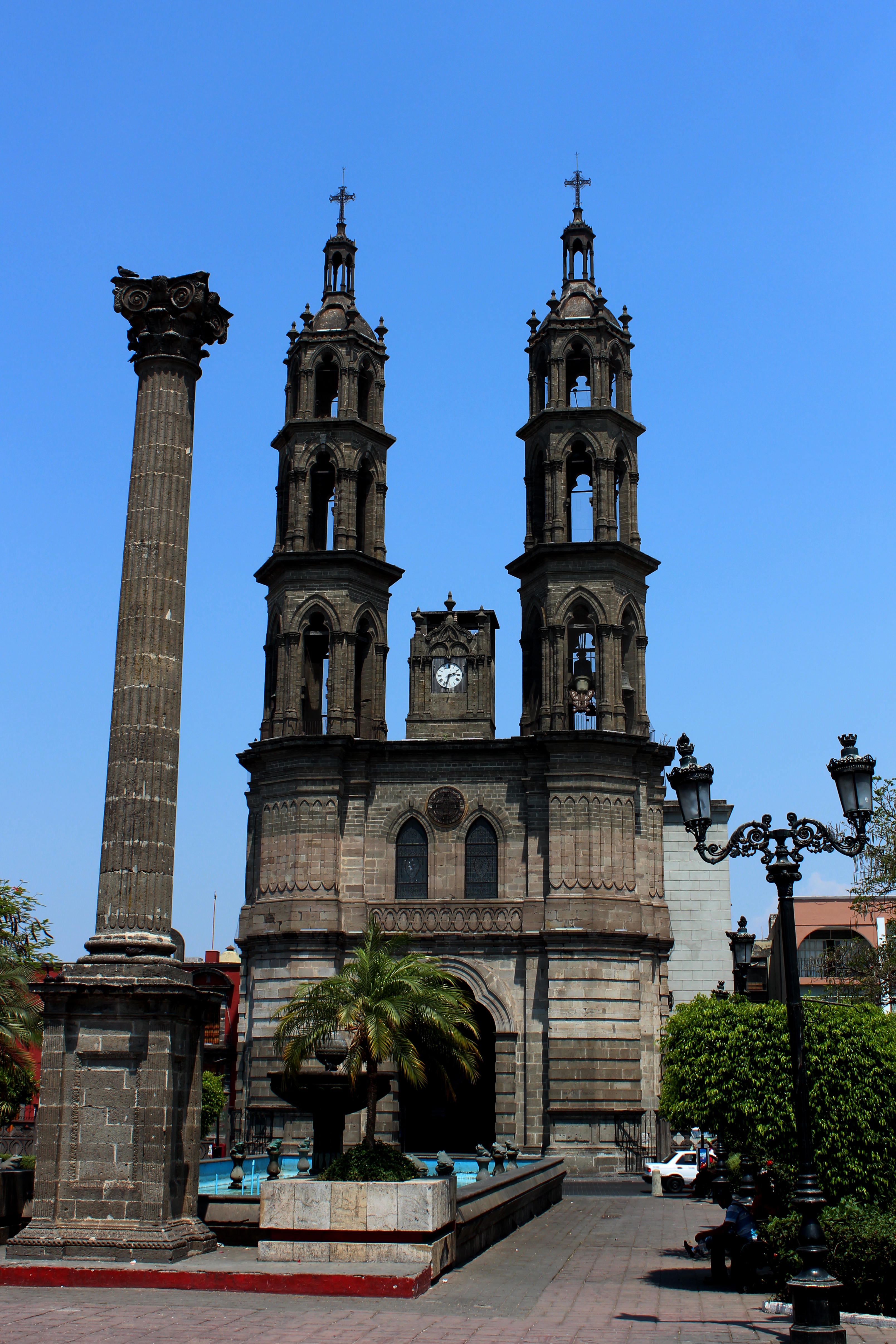 Catedral de Nuestra Señora de la Asunción, ubicada en la Tepic, Nayarit